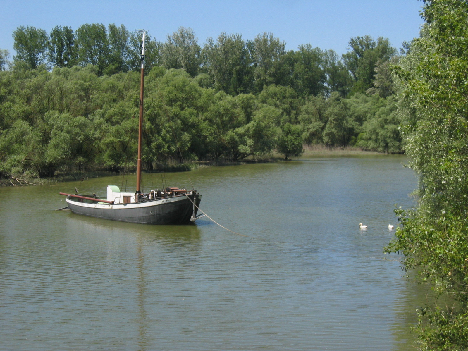 Aalschokker "Heini" auf dem Altrhein bei Rastatt; das Schiff war das letzte seiner Art und bis Ende der 1980er Jahre in Betrieb. Heute liegt es als technisches Denkmal vor Anker.